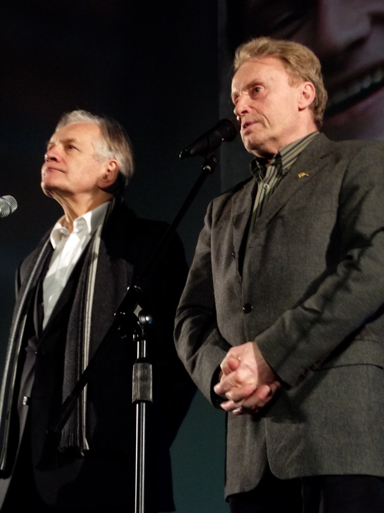 Zdjęcie zrobione podczas premiery zrekonstruowanej cyfrowo "Ziemi Obiecanej", podczas festiwalu filmowego OFF Plus Camera.